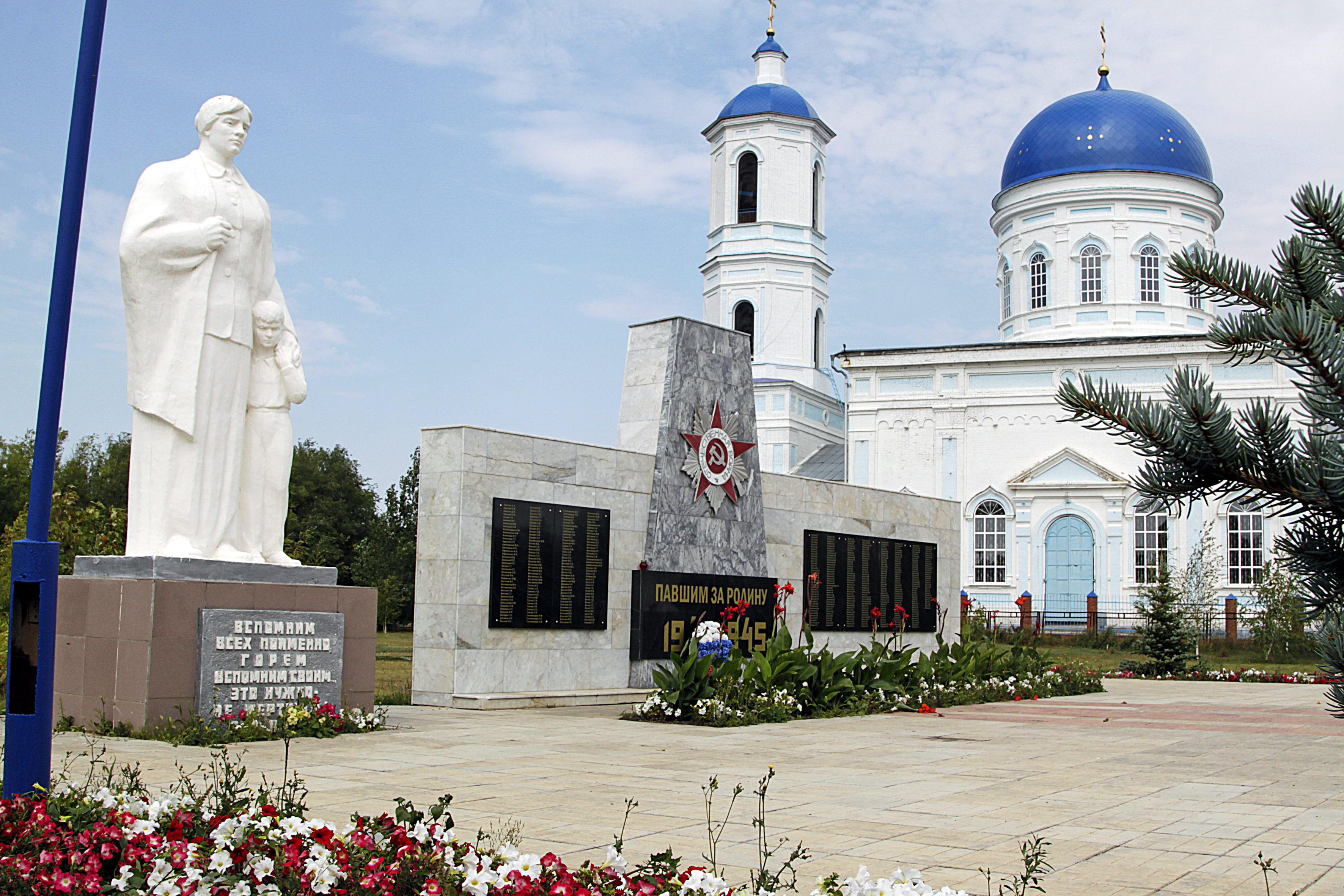 Парк Победы в Алексеевке